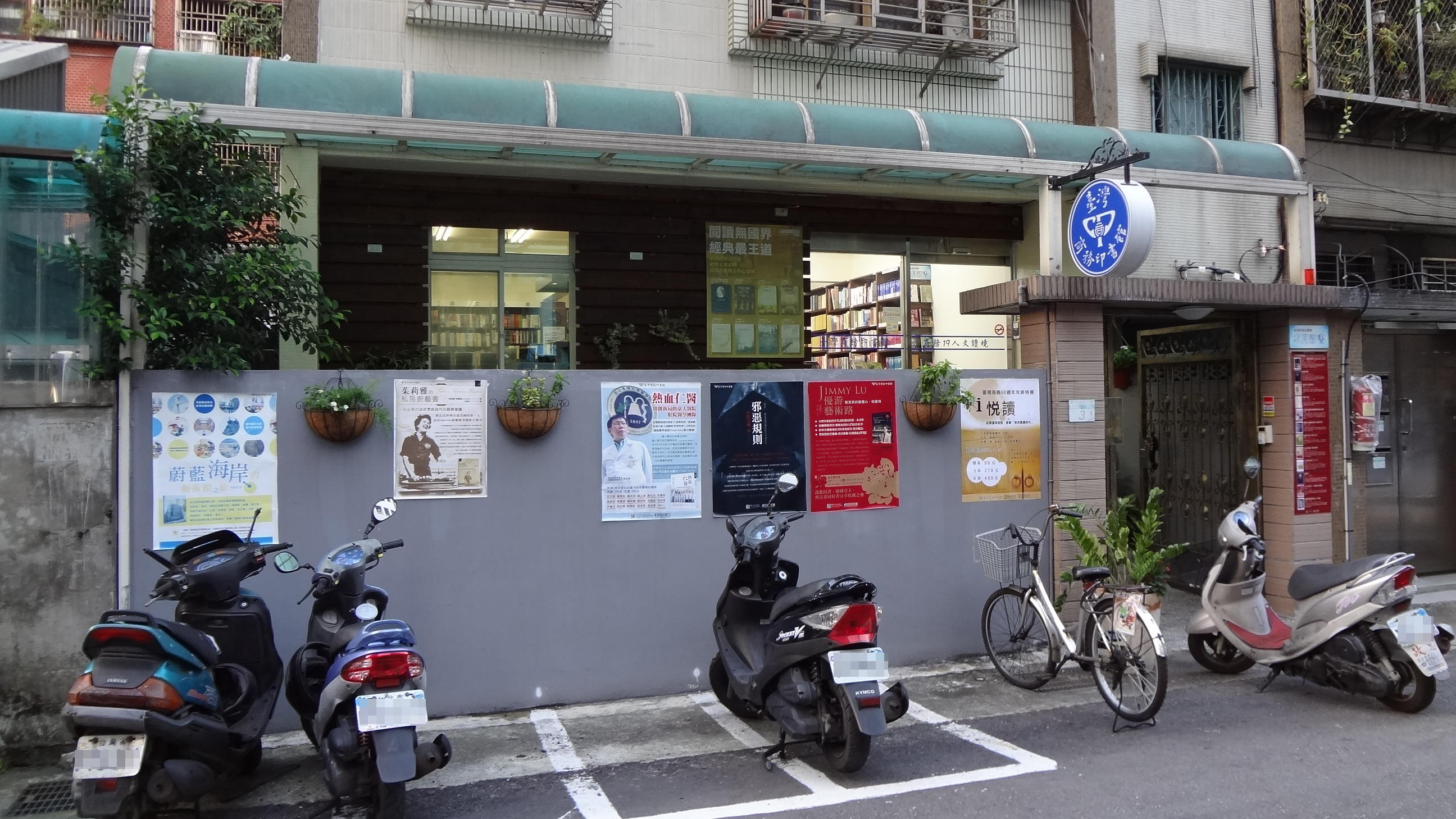 臺灣商務印書館新南門市，位於臺北市大安區新生南路三段19巷3號1樓，已歇業。